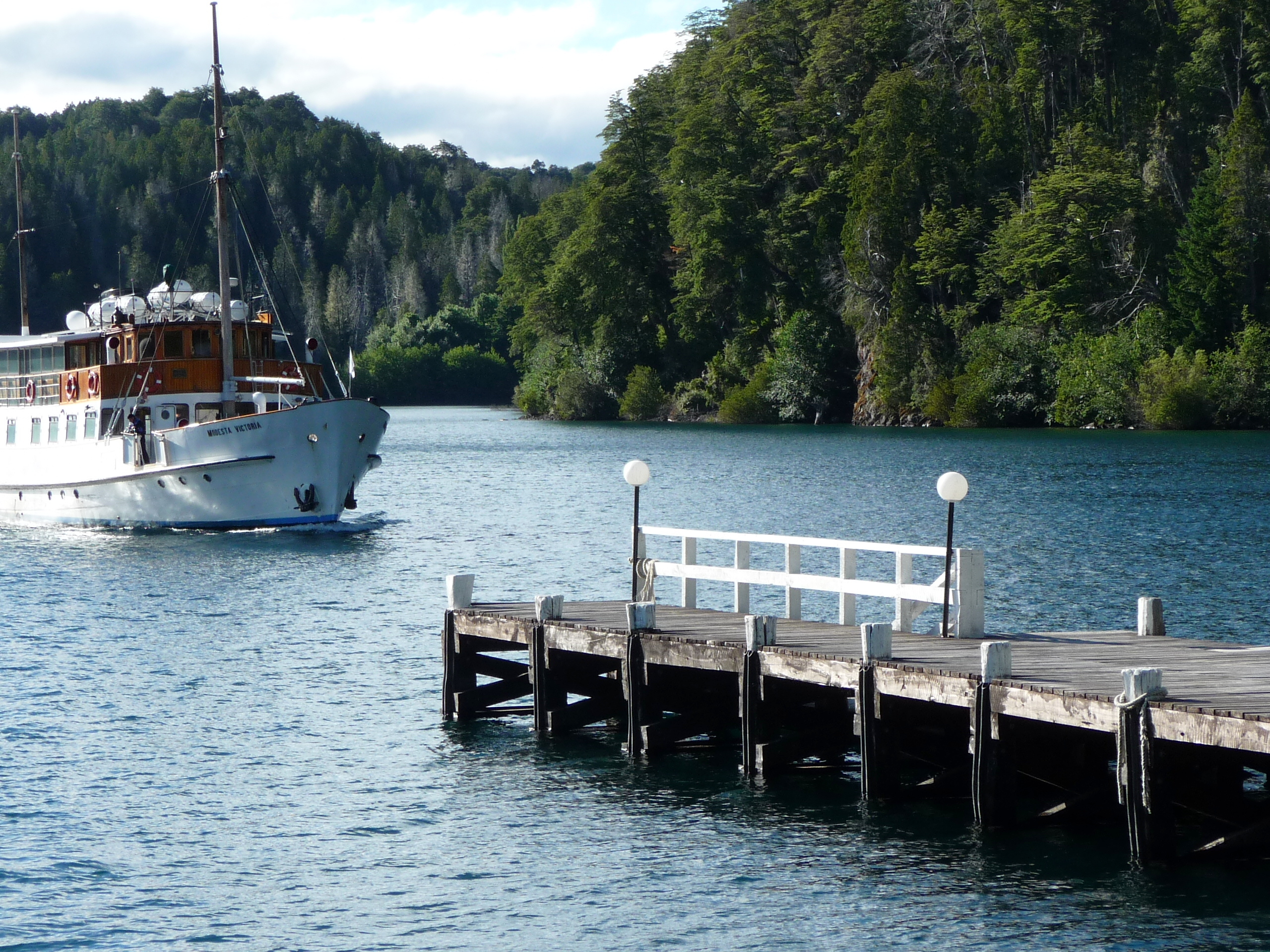 Muelle de Puerto Anchorena en la Isla Victoria, Lago Nahuel Huapi. Se ve el barco Modesta Victoria, uno de las embarcaciones que realizan excursiones en este lago.